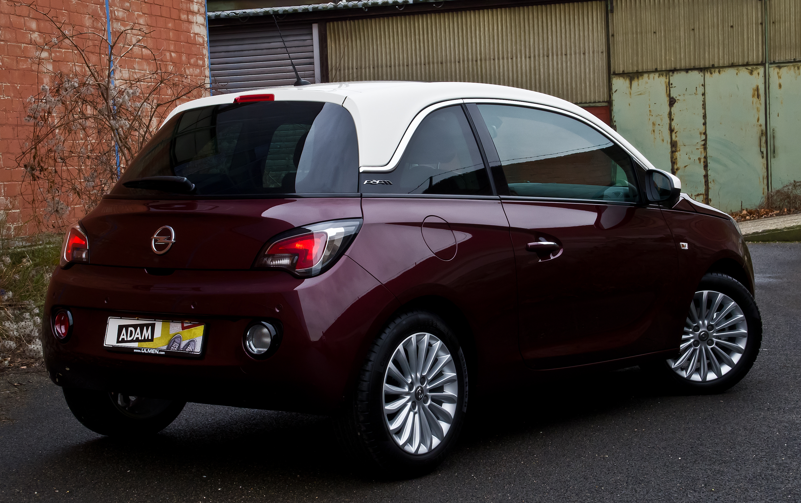 Opel Adam 1.4 Glam